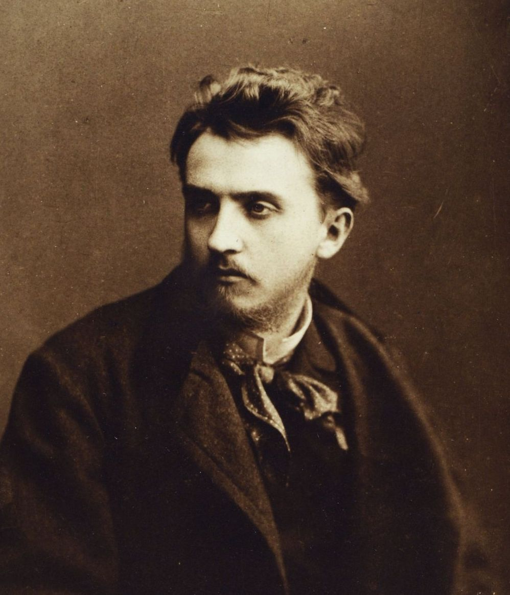 Aggházy Károly a Nemzeti Zenede nagy hírű zongoratanára